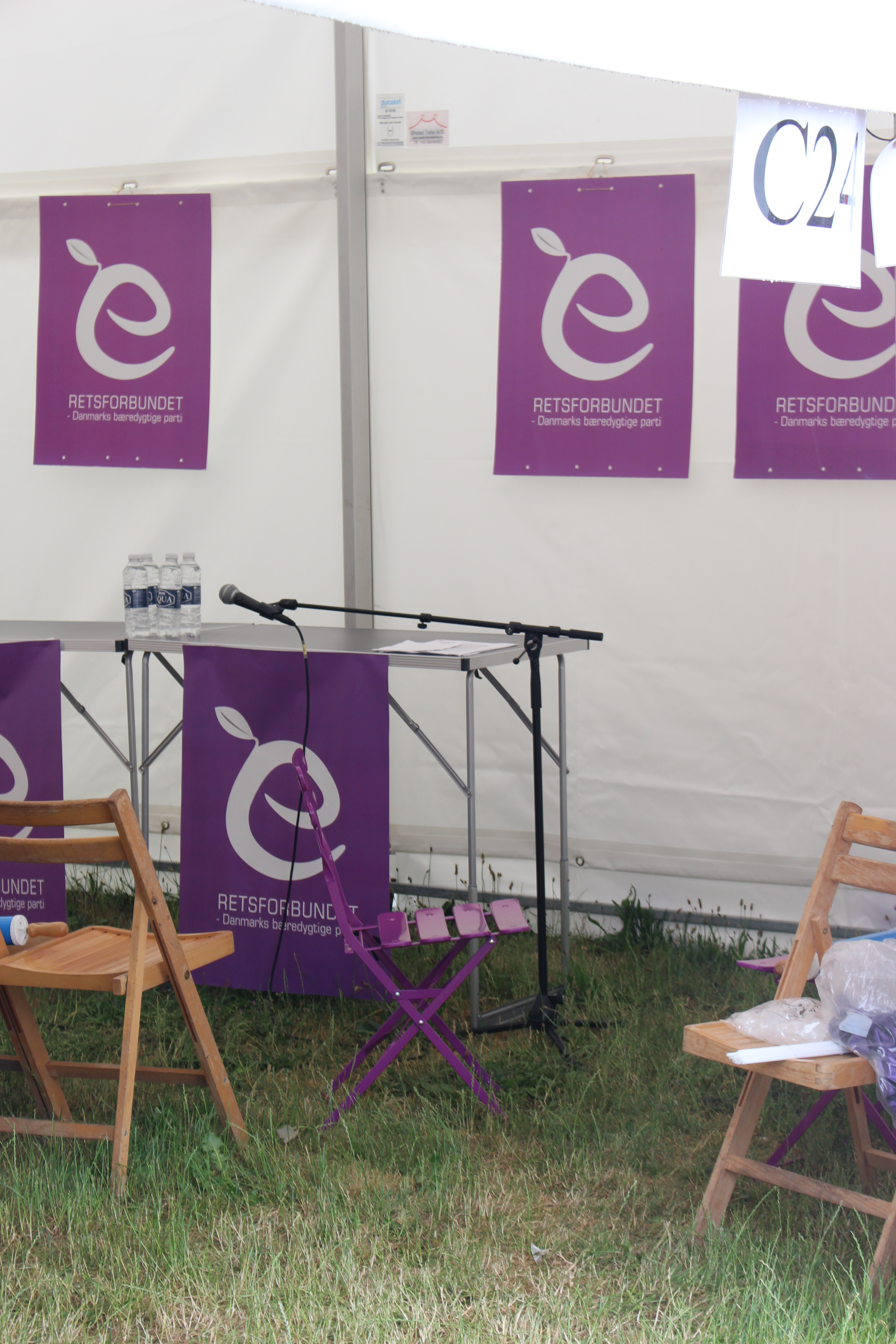 Retsforbundets telt ved Folkemødet 2016